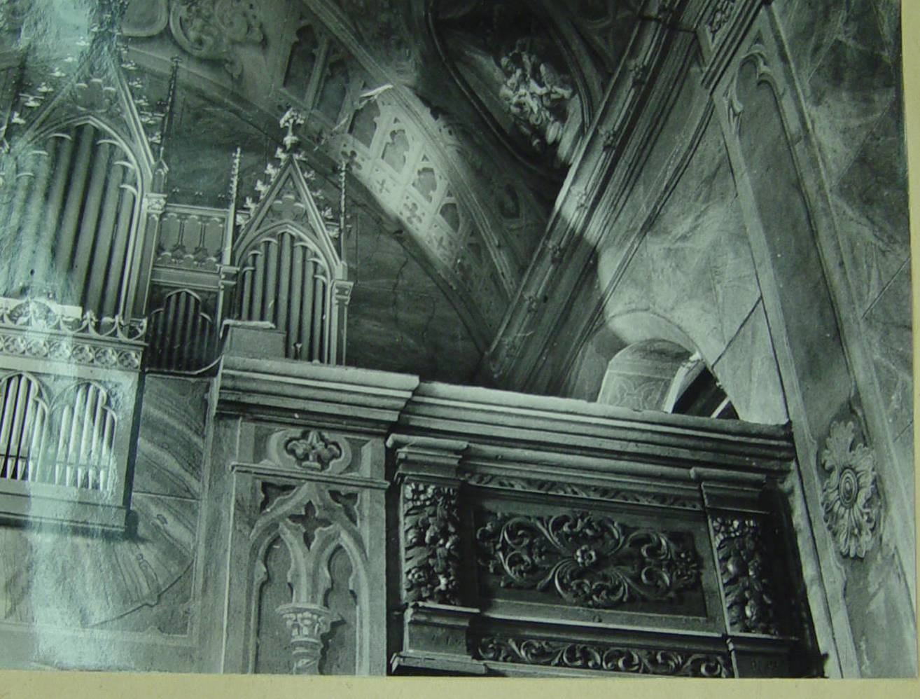 Chorus s organom a povodnou malovanou klenbou 1956